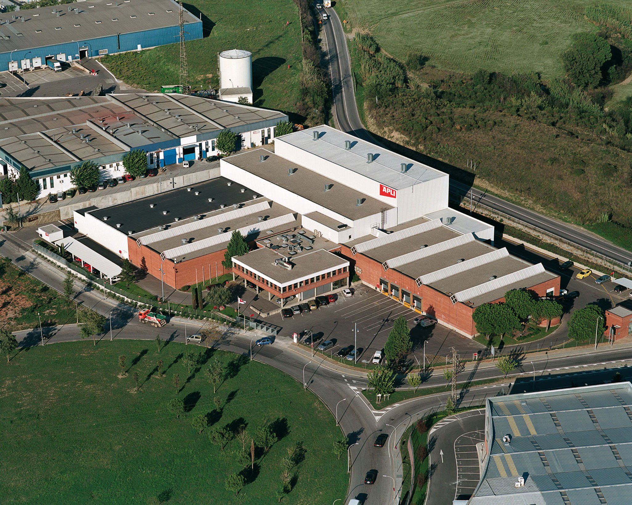 APLI PAPER S.A., Barberà del Vallès, España.